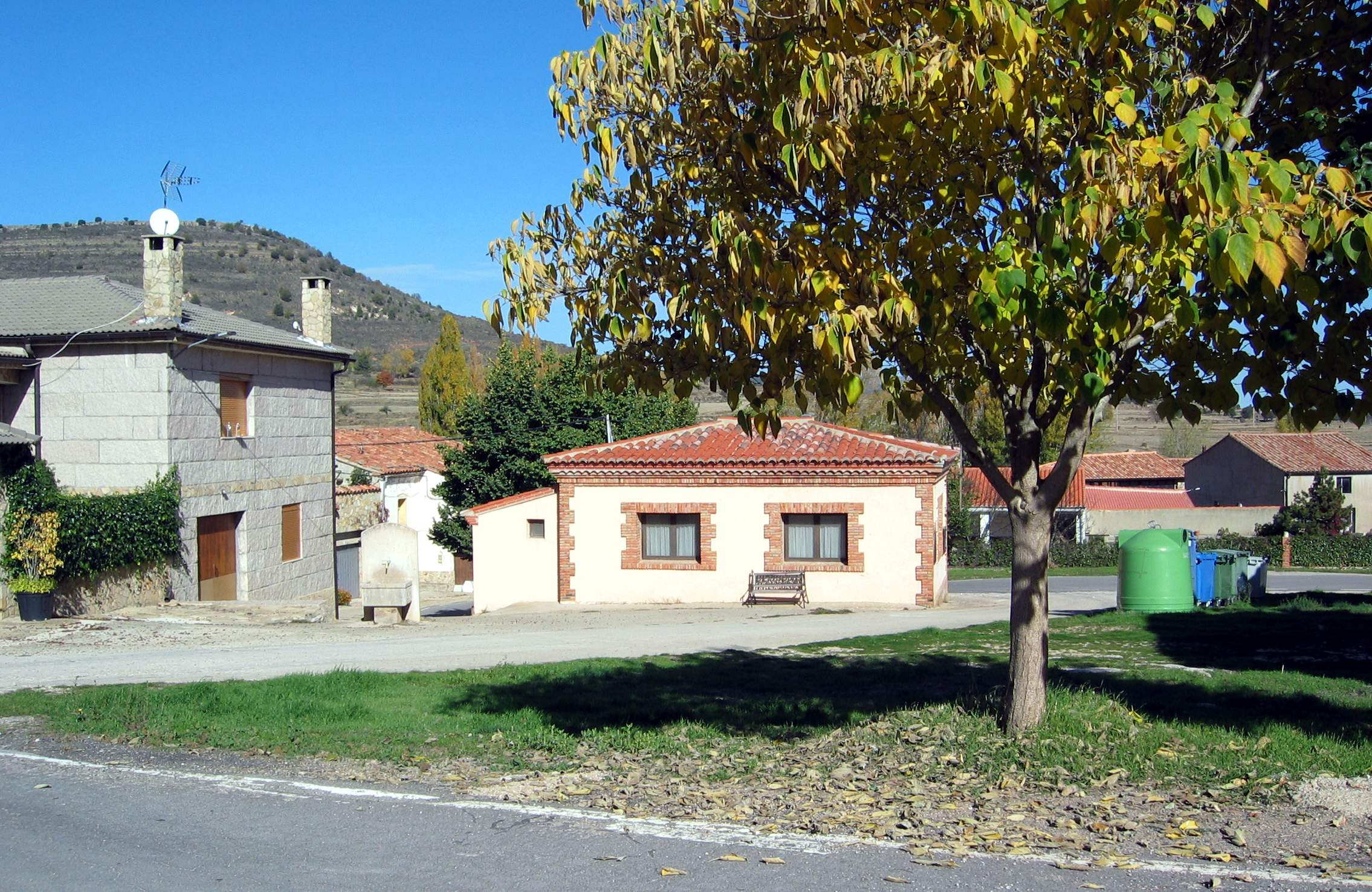 Vista meridional del edificio de las antiguas Escuelas Nacionales, hoy "Consultorio Médico-Sanitario" en Arroyo Cerezo, Castielfabib (Valencia), año 2016.